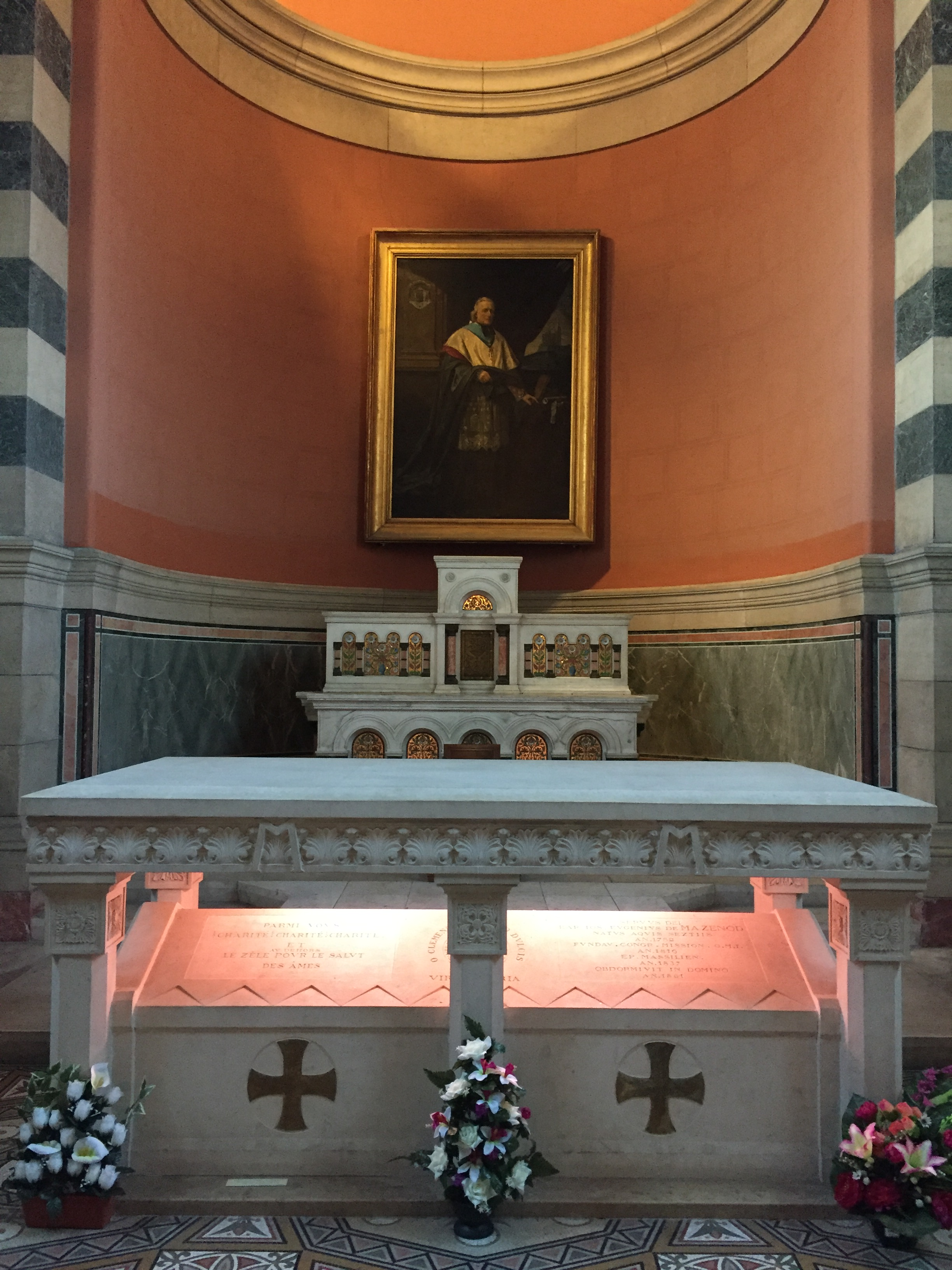 Tombe de Monseigneur de Mazenod